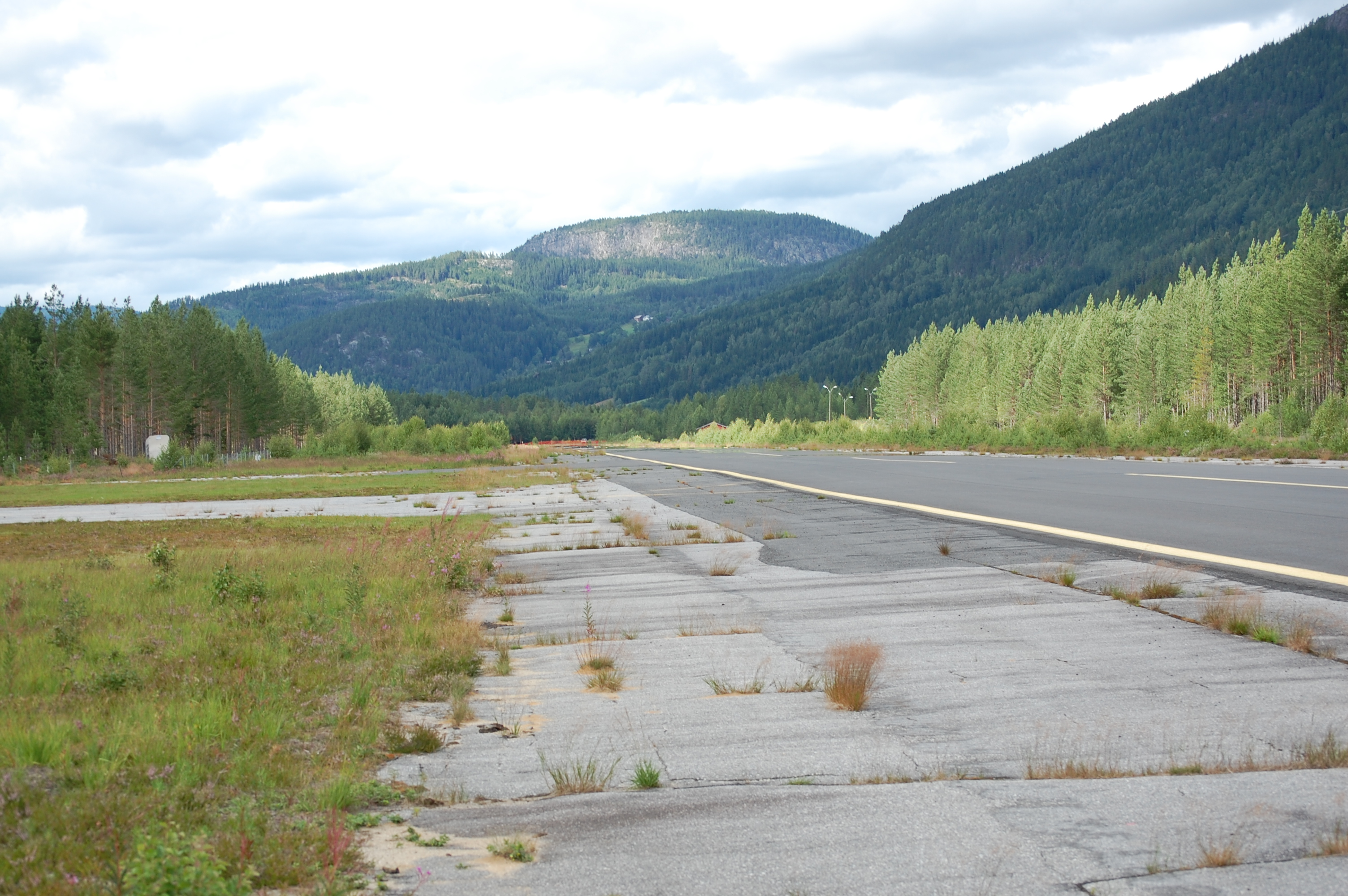 Landingsstripa på Fyresdal flyplass